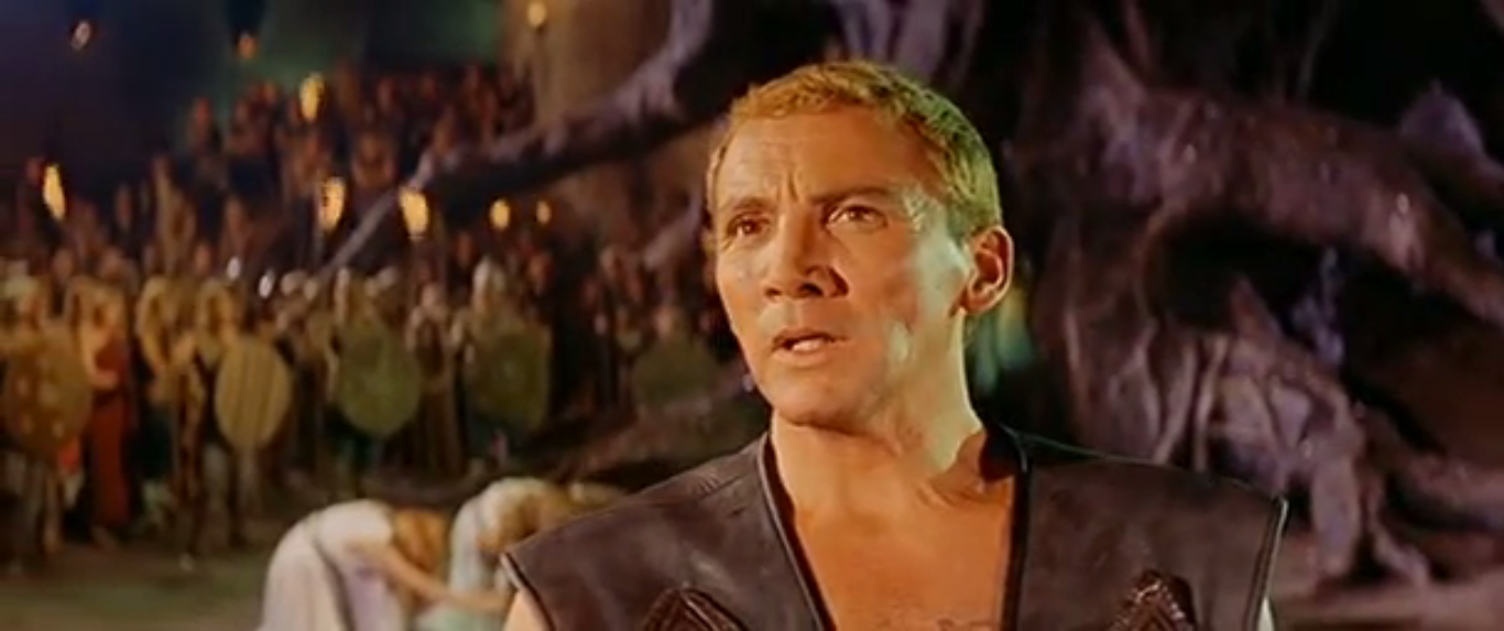 screenshot di Gli invasori di Mario Bava